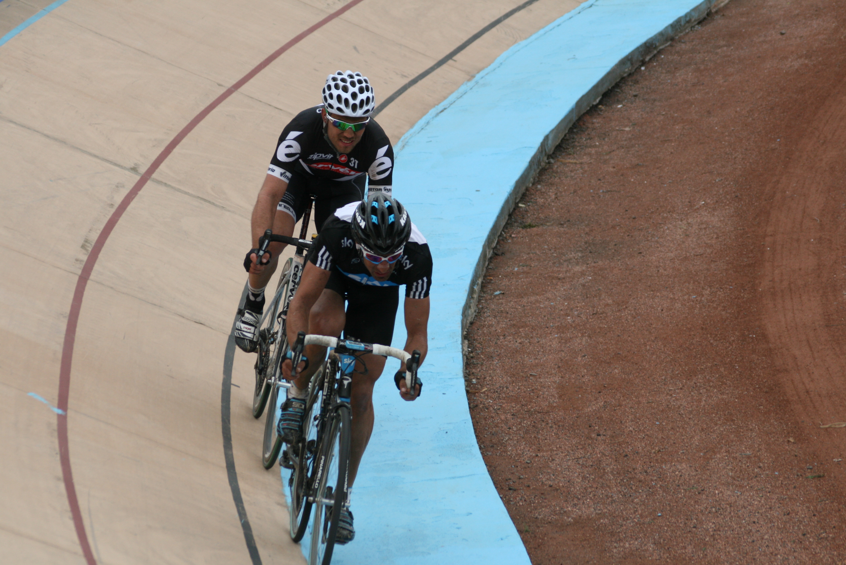 Thor Hushovd et Juan Antonio Flecha à l'arrivée de Paris-Roubaix 2010